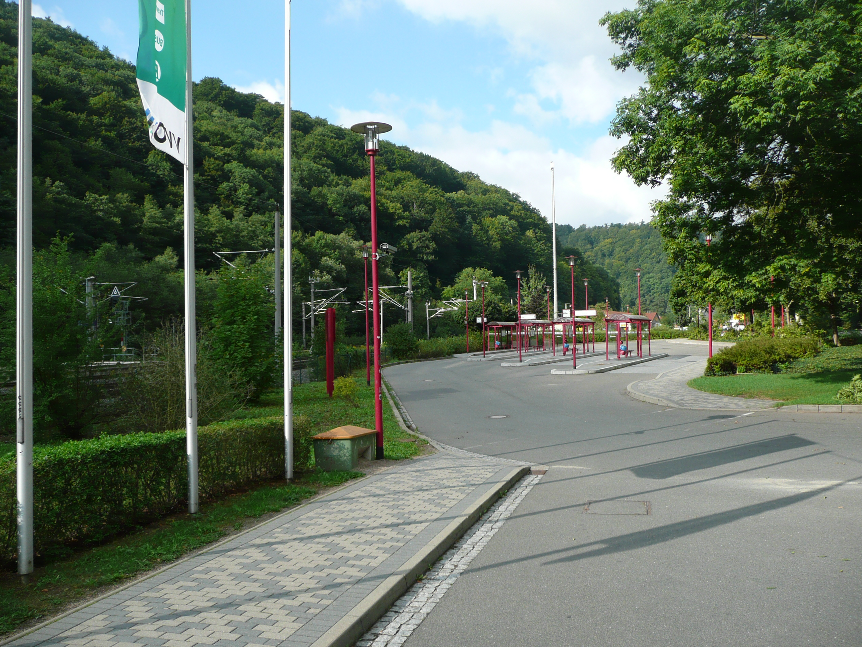 Busstände des Bahnhofes Tharandt